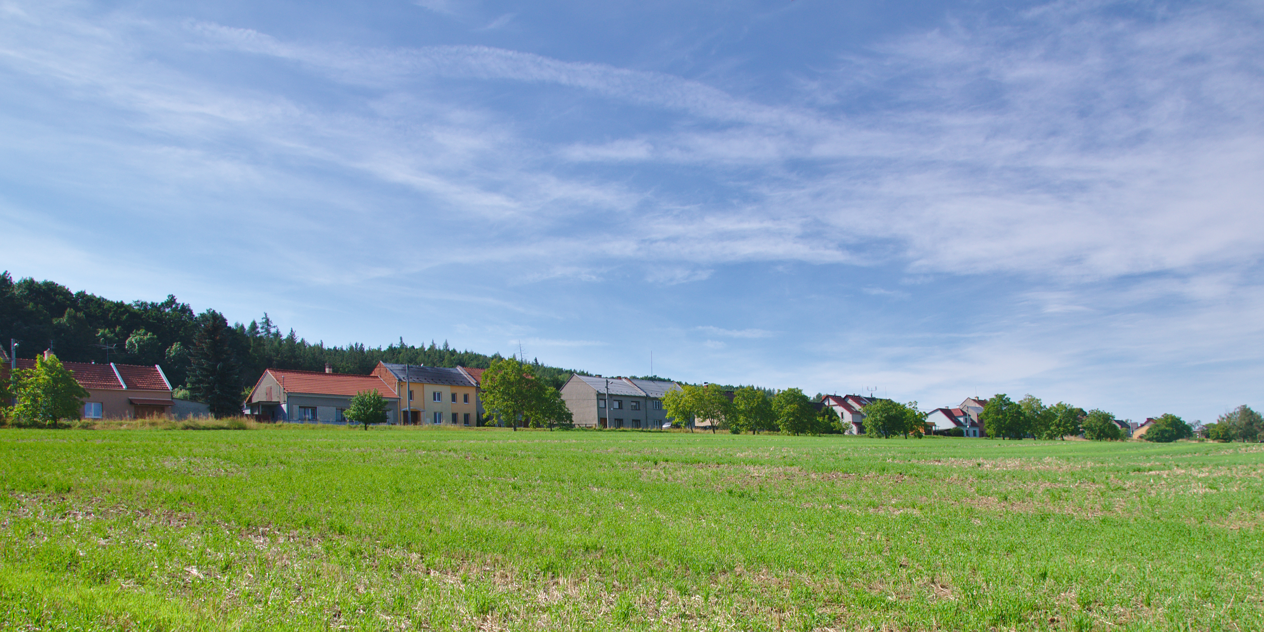 Pohled na obec od severu, Lhota pod Kosířem, Drahanovice, okres Olomouc